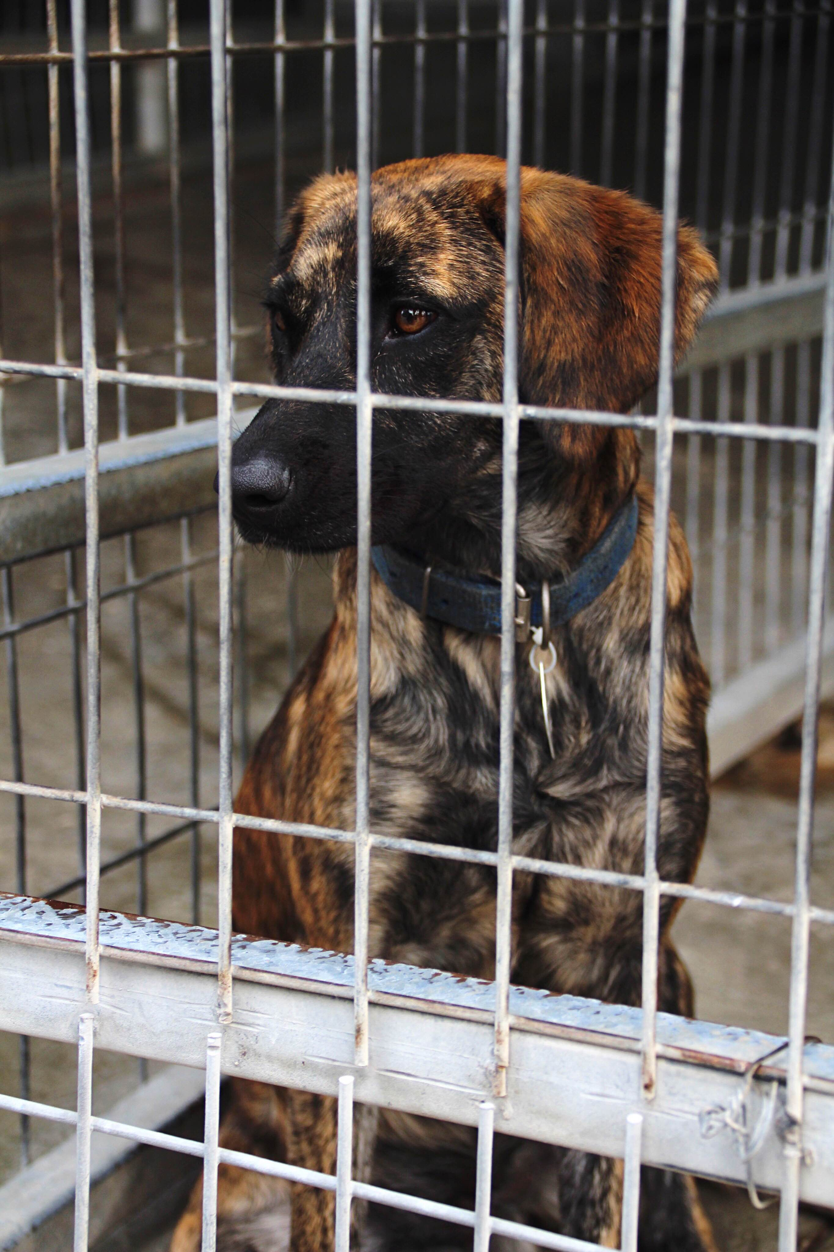 כלב בבית מחסה בחיפה